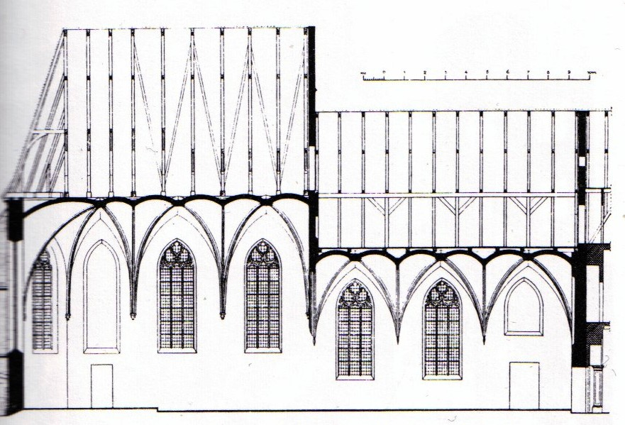 Längschnitt von Kloster Niesing in Münster/Westfalen von Albert Ludorff